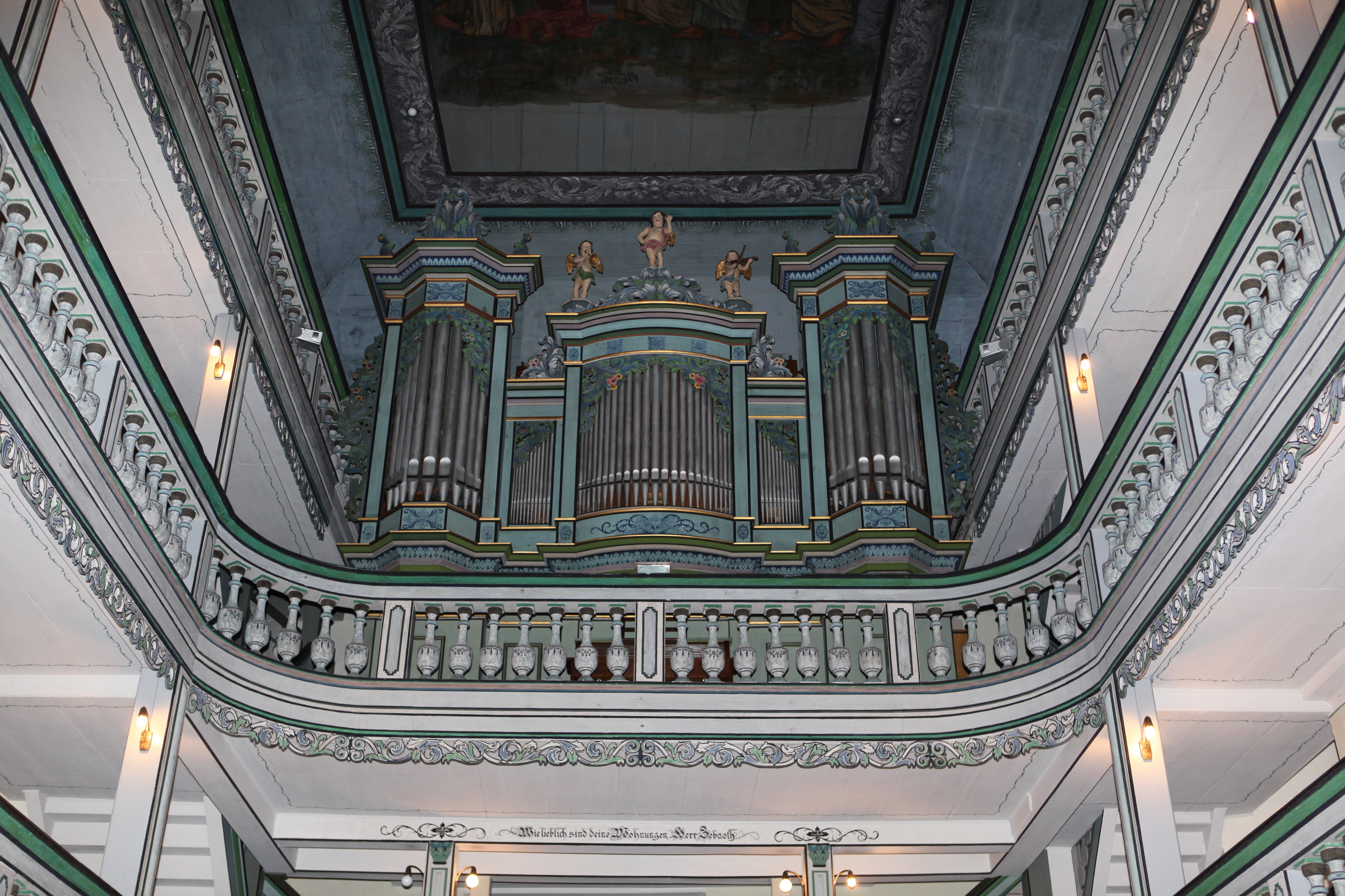 Orgel St. Marien in Gräfenthal